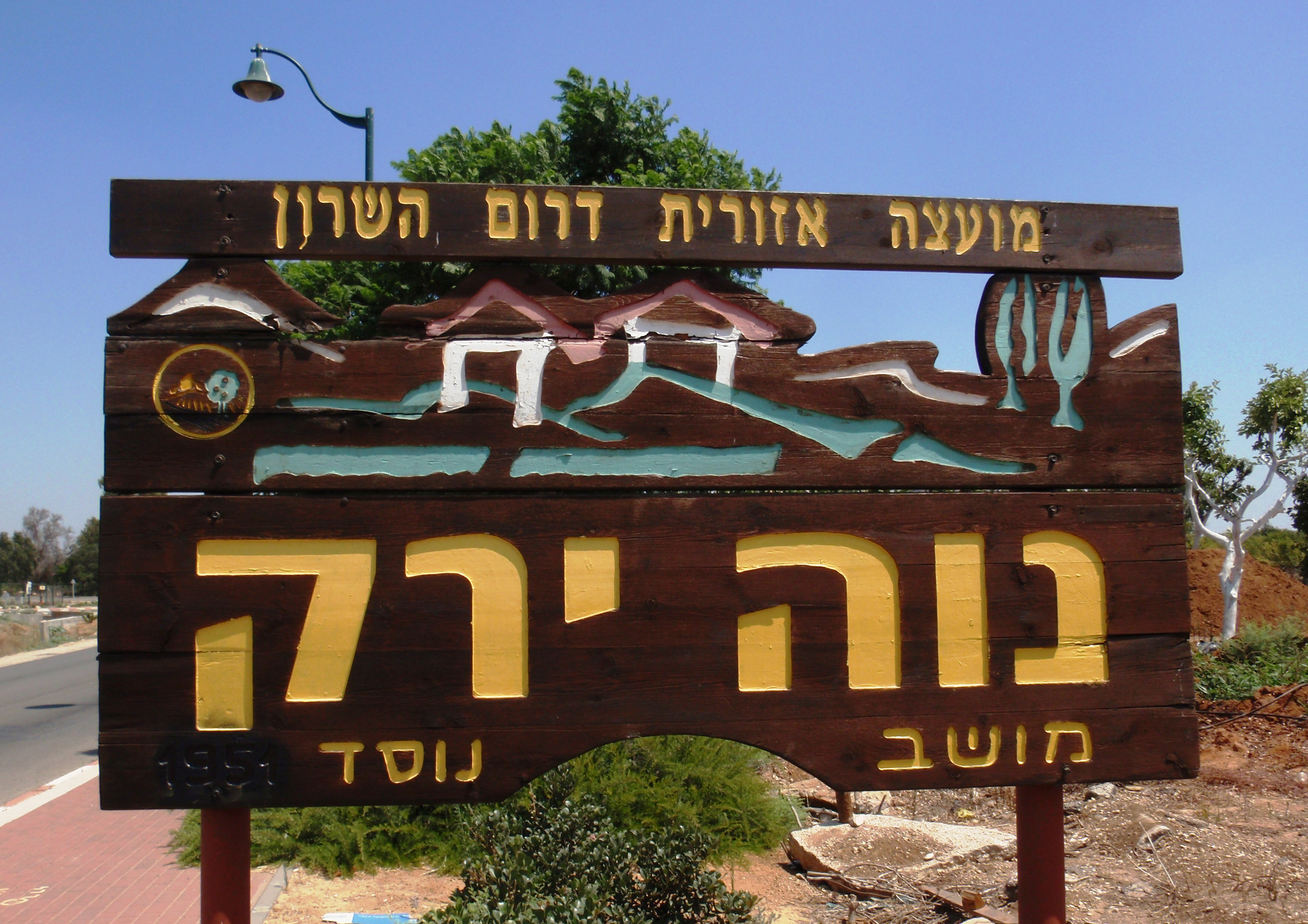 Moshavim שלט הכניסה למושב